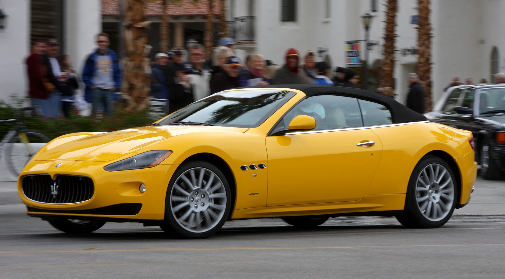 2011 Desert Classic, La Quinta, CA